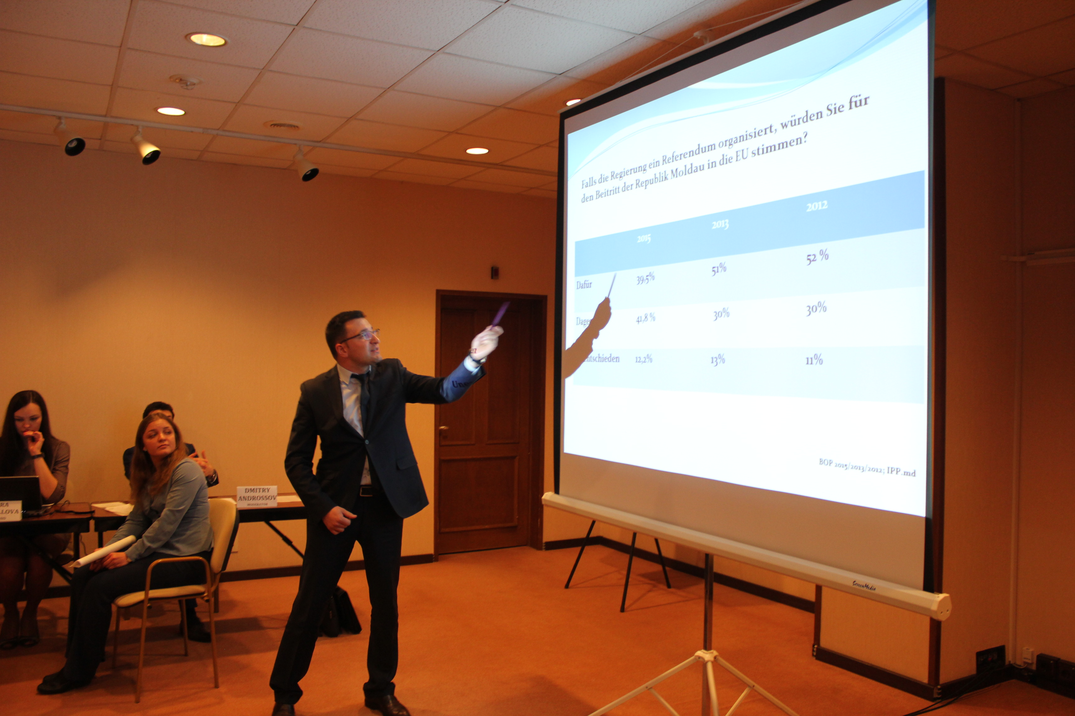 Vom 26. bis 29. Mai 2015 fand in Moskau zum ersten Mal die regionale IPS-Konferenz statt, wobei diese durch IPS-Alumni aus Russland organisiert wurde. Credit: Asif Masimov